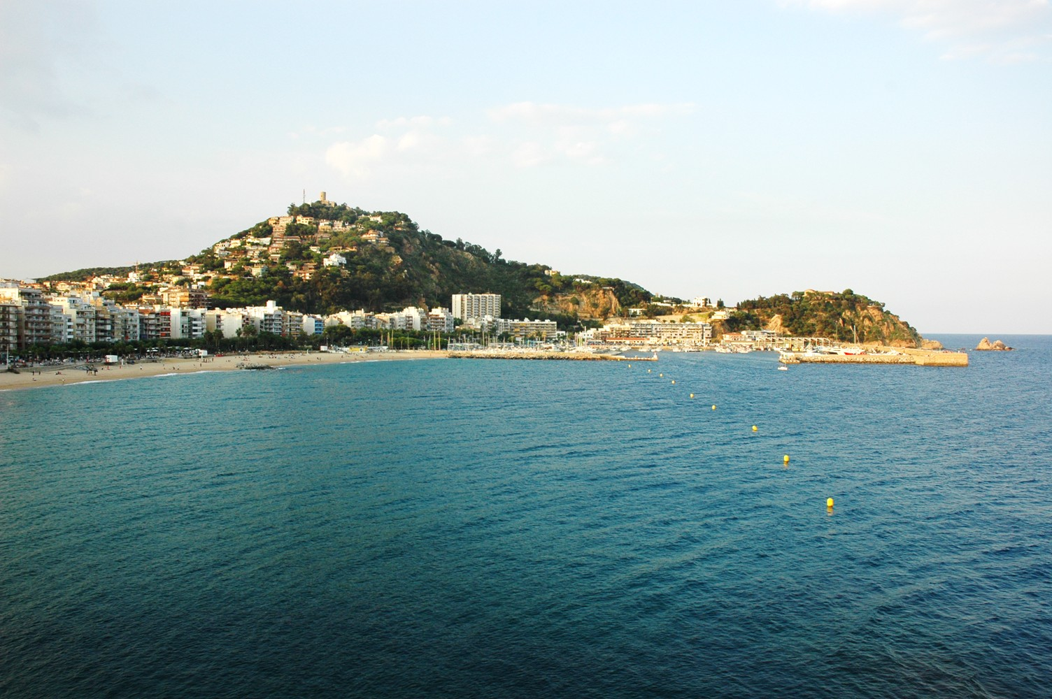 Badia de Blanes, Girona, (Catalunya).